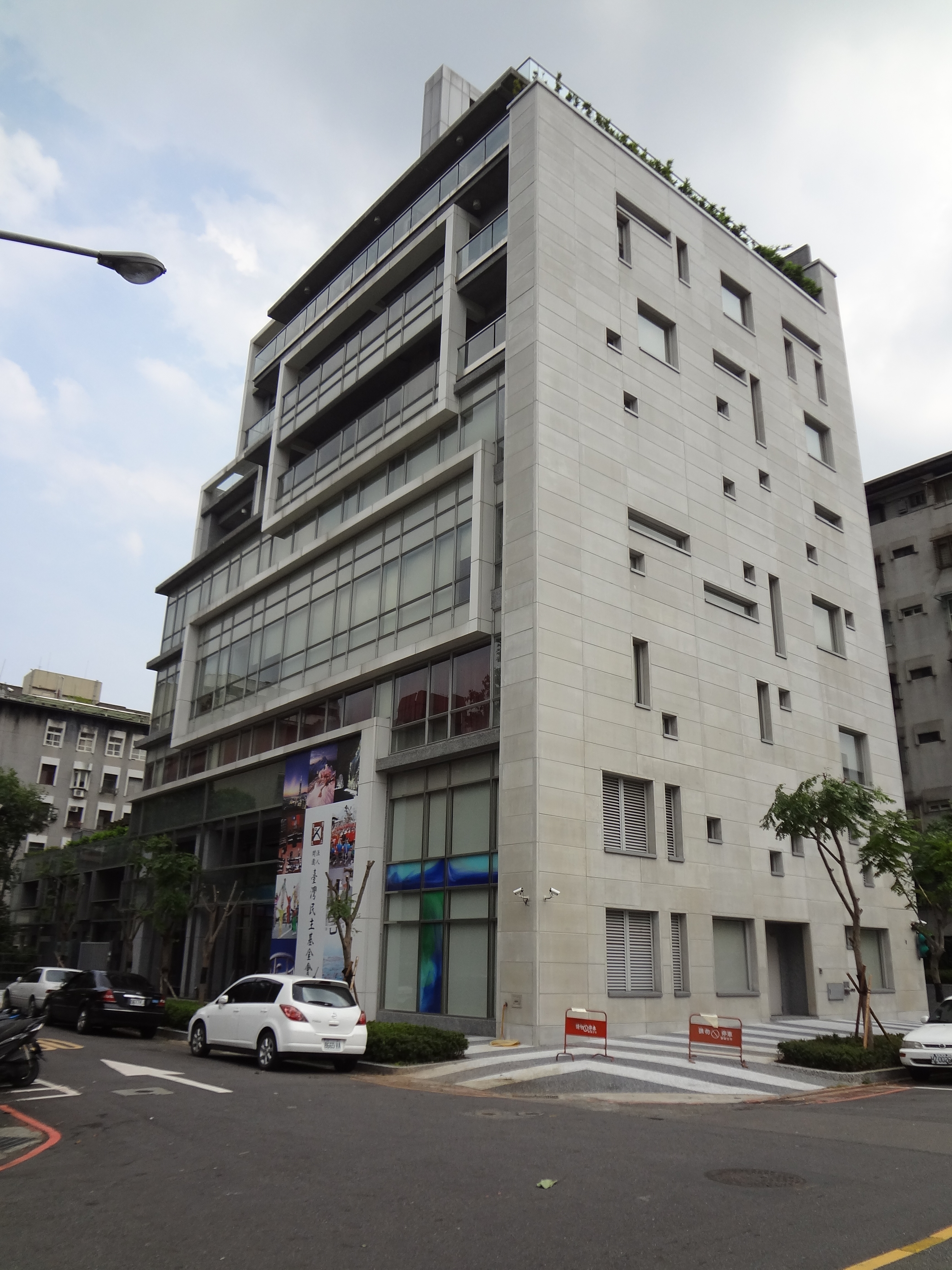 臺灣民主基金會總部大樓，位於臺北市大安區信義路三段147巷17弄4號，2013年6月16日落成啟用。